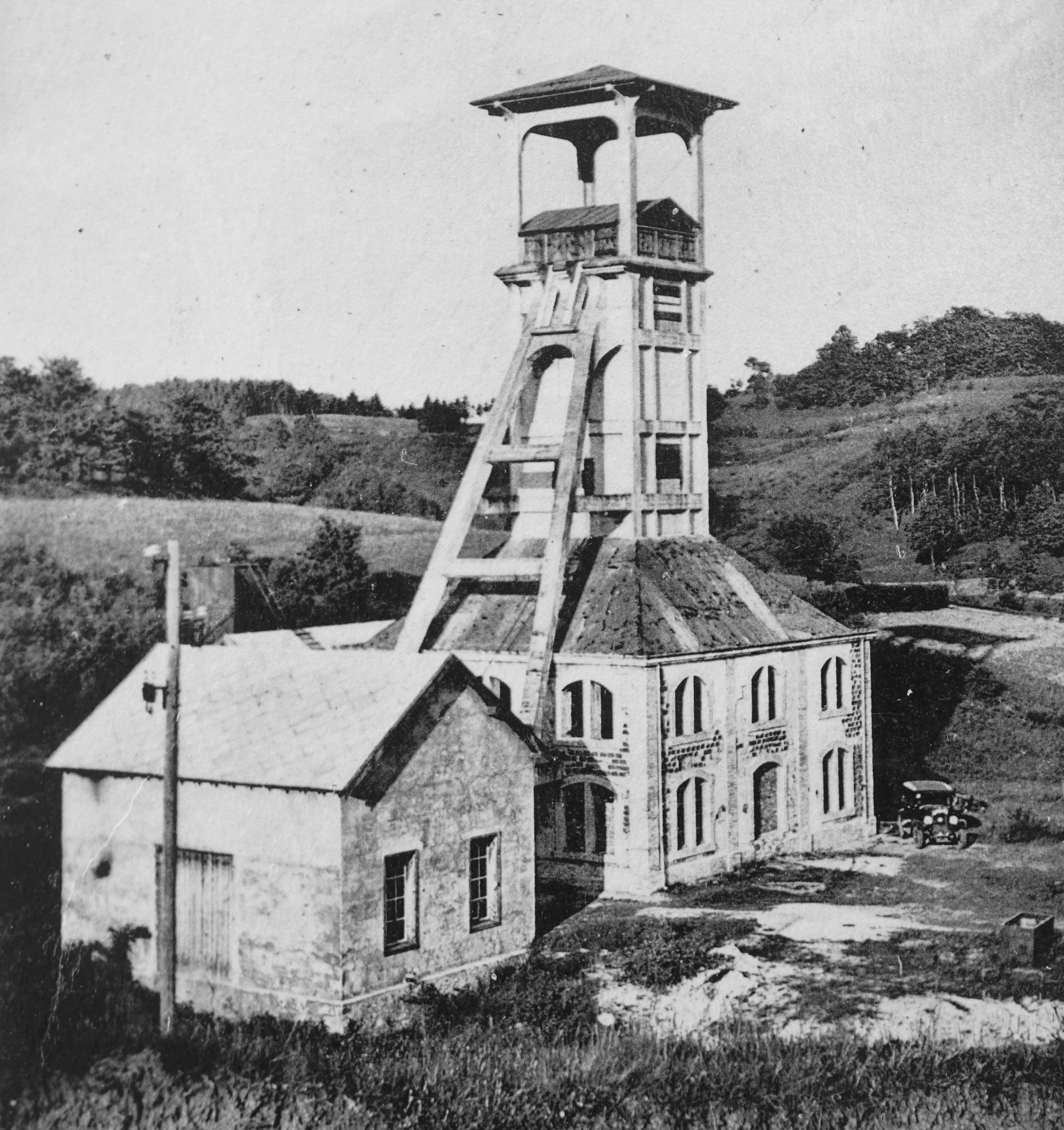 Les nouvelles installations du puits Saint-Marie, peut après leur construction.